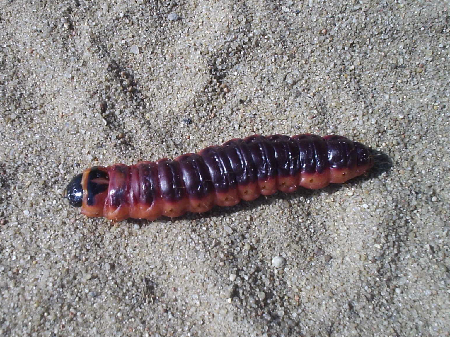 Gąsienica - rząd: motyle Lepidoptera; rodzina: trociniarki Cossidae; gatunek: Trociniarka czerwica Cossus cossus.